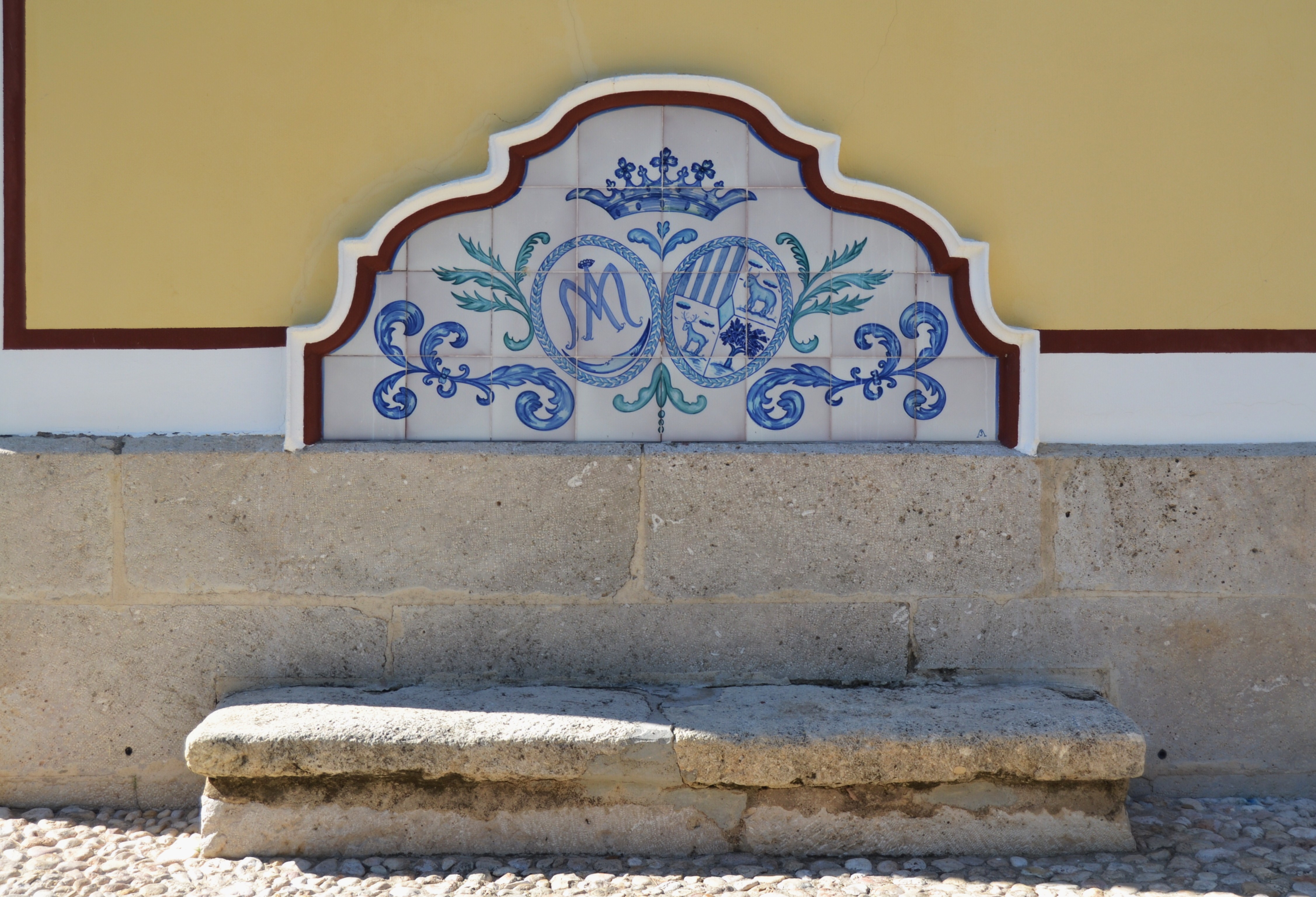 Ermita del Crist de la Providència d'Anna, banc.